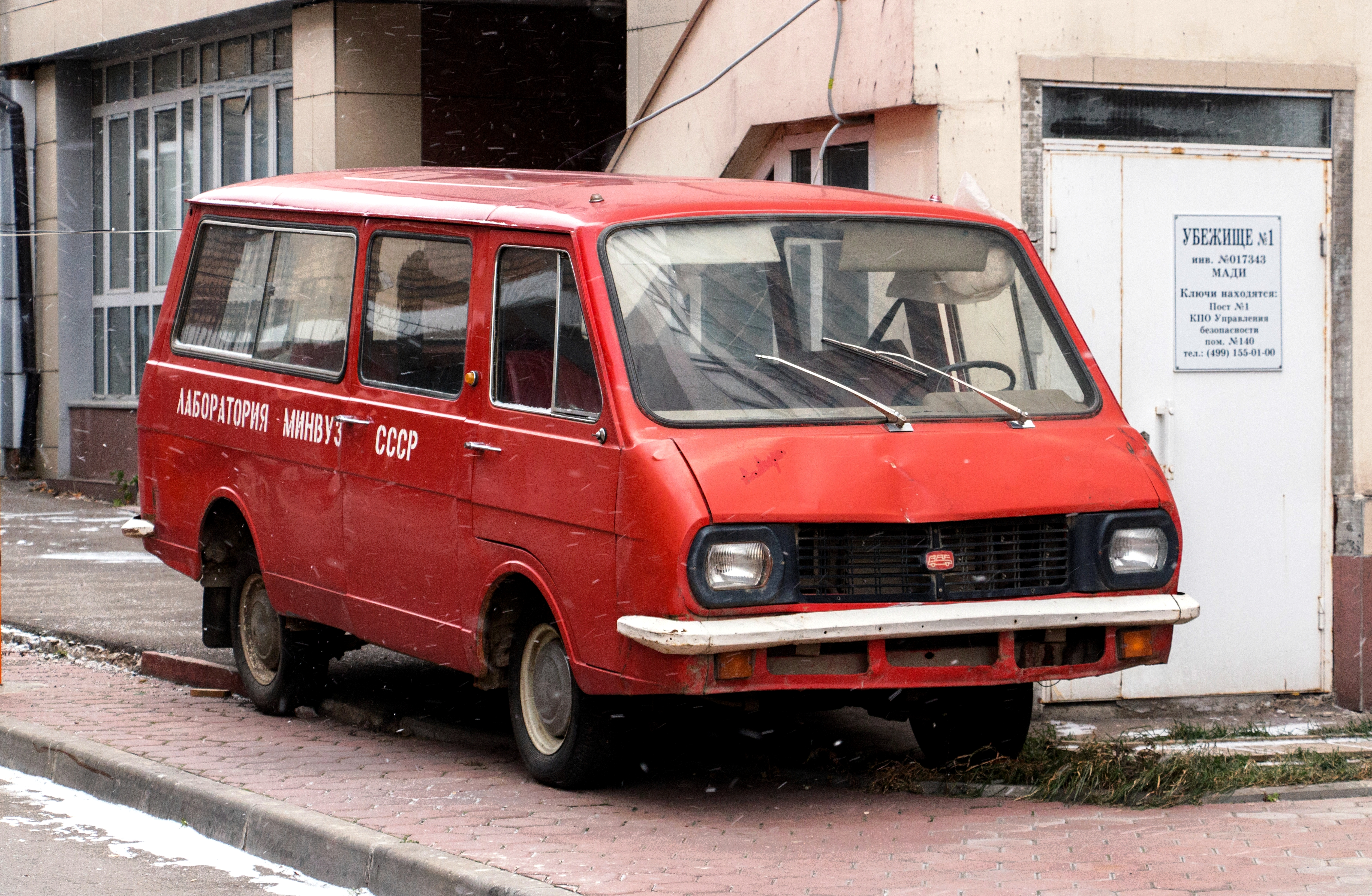 Автобус РАФ-2203 "Лаборатория МИНВУЗ СССР" на территории МАДИ